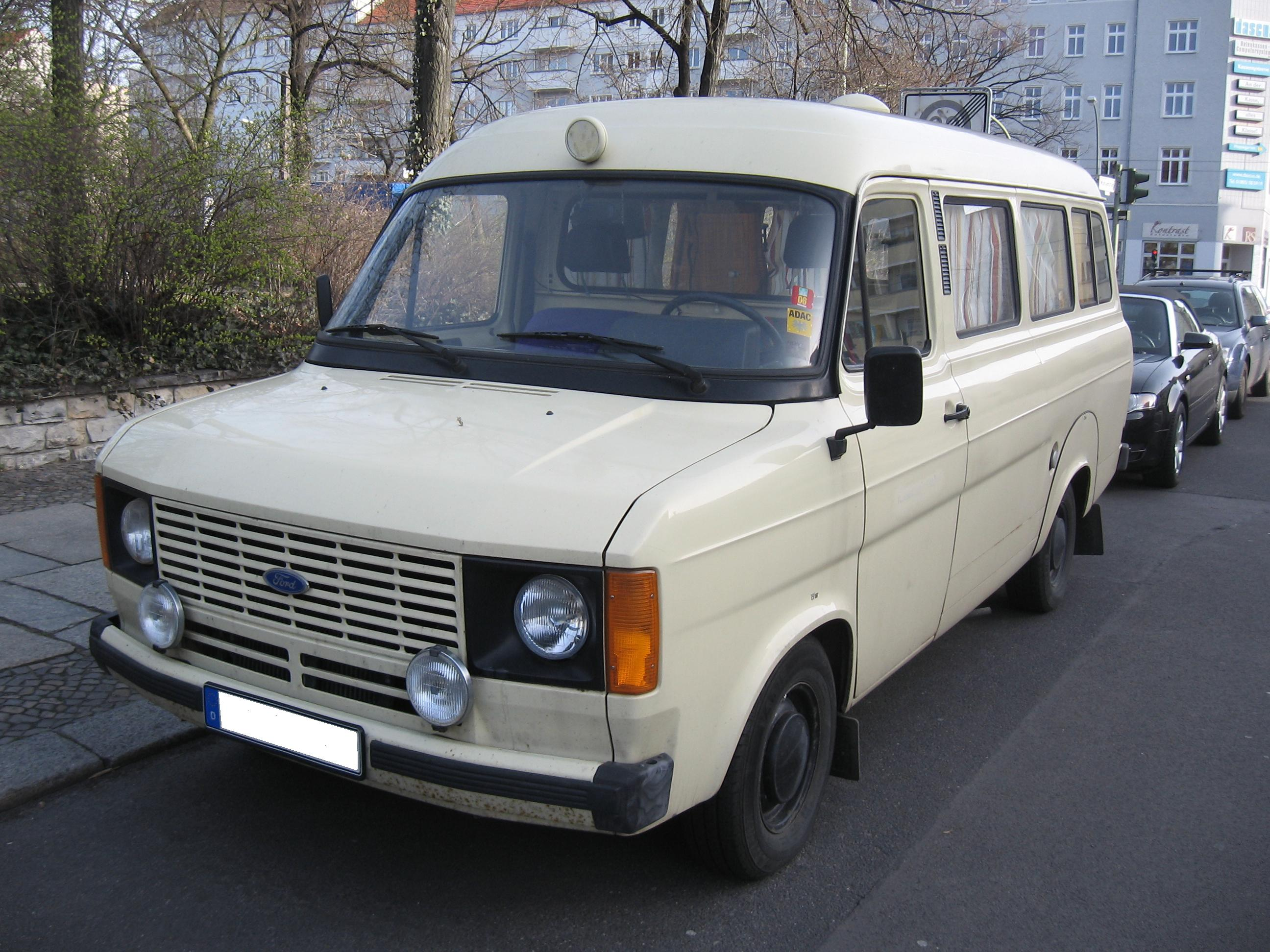 Ford Transit ex Krankenwagen, Baujahr ab 1978, vor Facelift